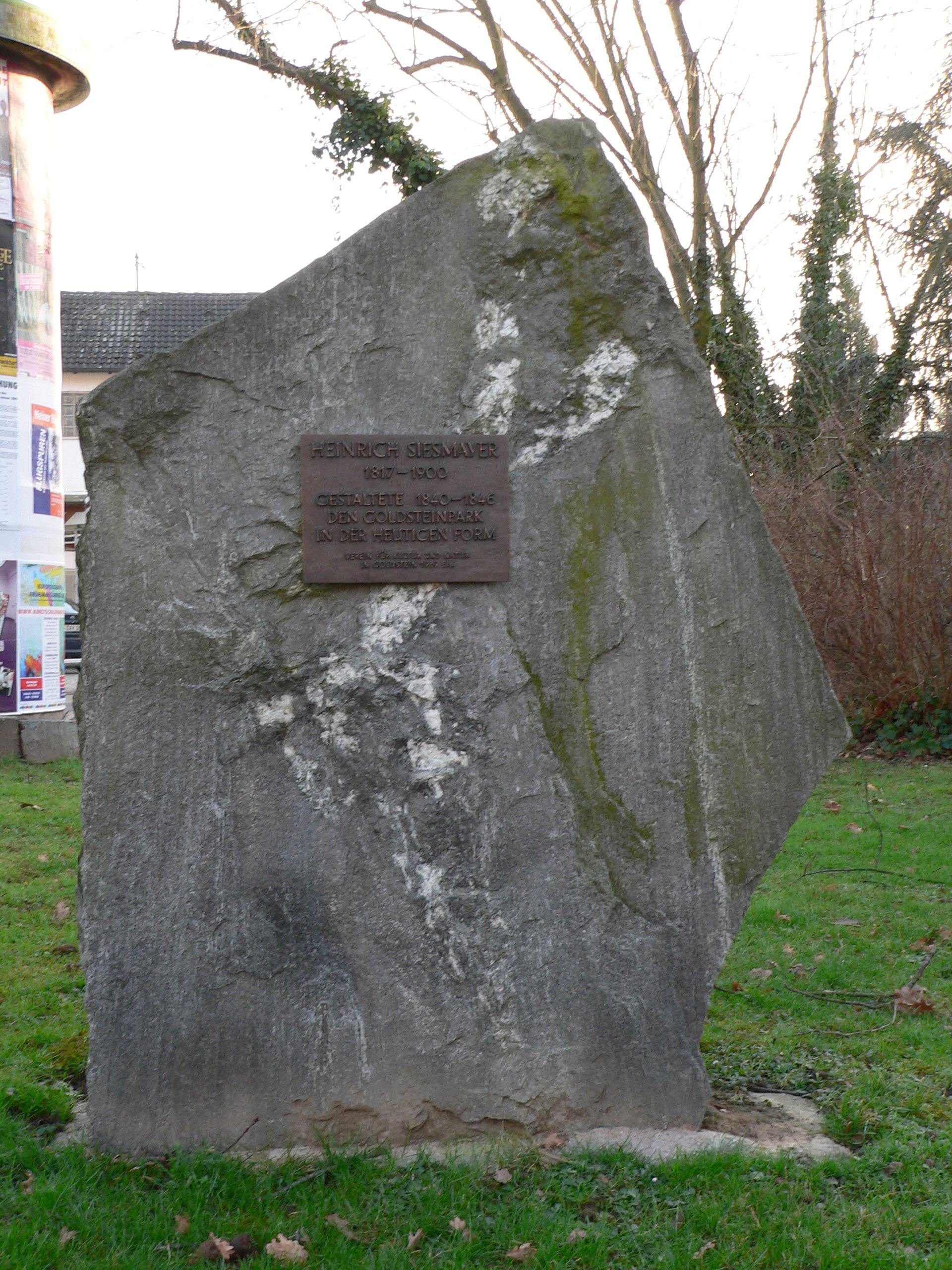 Frankfurt-Goldstein - Siesmayerstein im Goldsteinpark